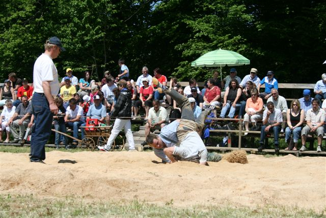 Baldeggschwinget, Pfingsten 2008, Baden AG, Schweiz